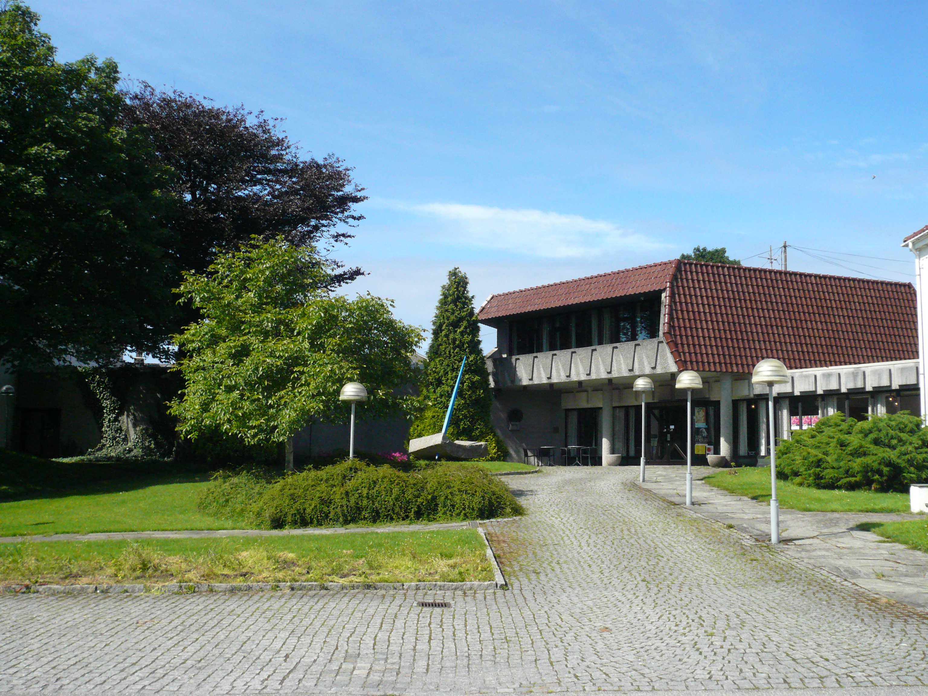 Haugesund Billedgalleri, inngangsparti